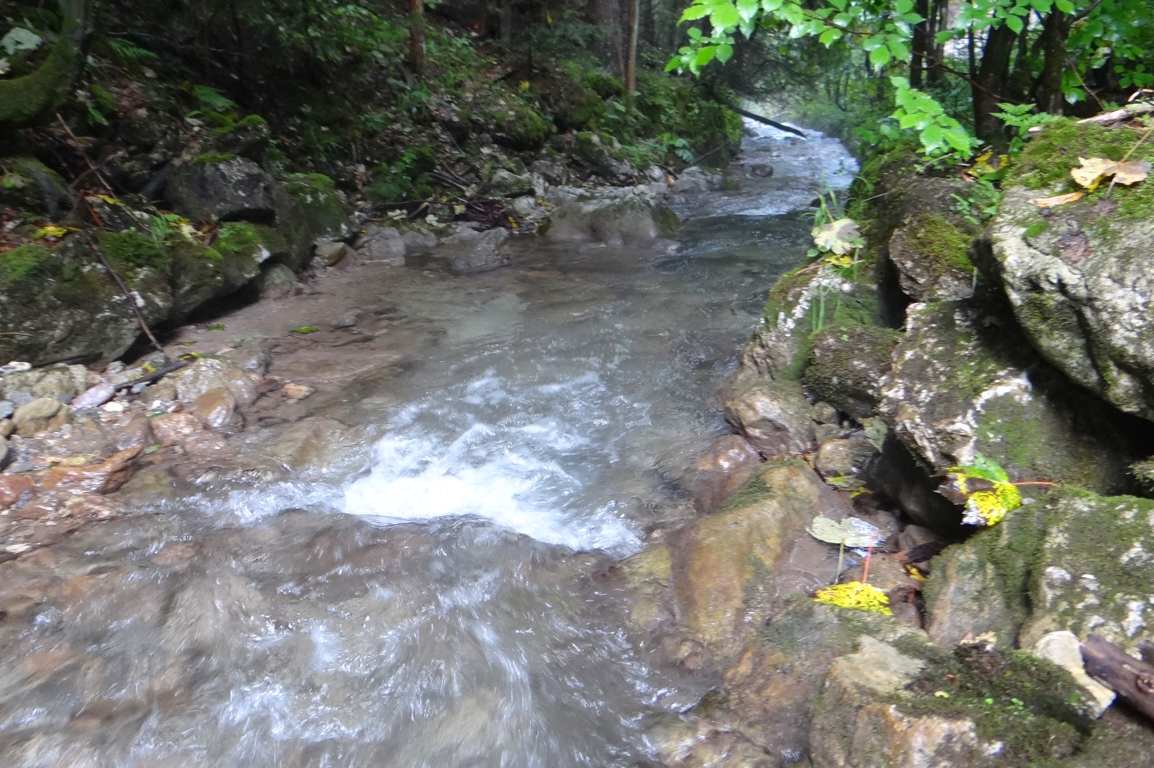 Bystrica (prítok Hrona) w Dolnym Harmanecu